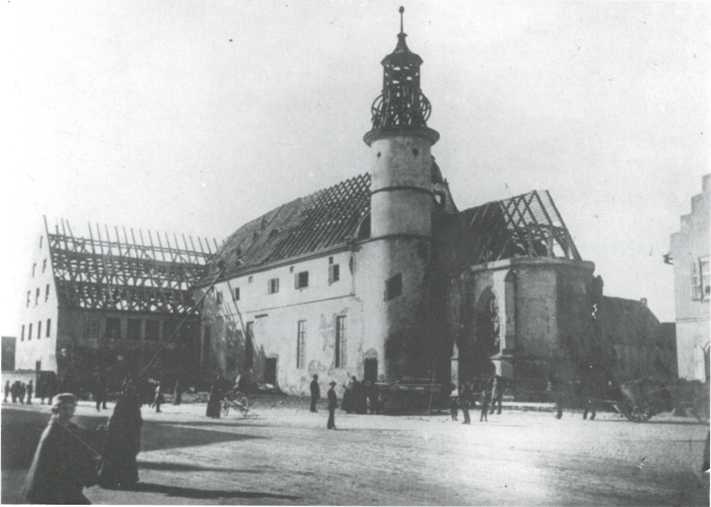 Schweinfurt: Spitalkirche Hl. Geist während des Abbruchs. Aufgenommen im Jahr 1896.